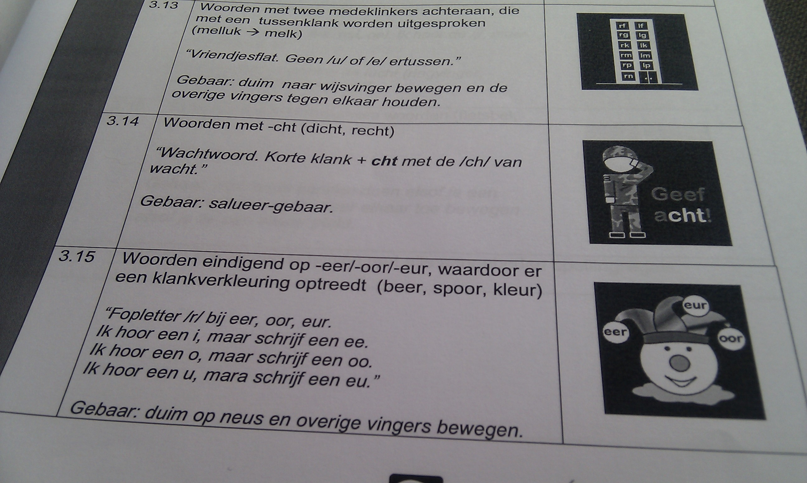 Een leerlijn spelling voor groep 3. De leerlijn is door mij gemaakt.